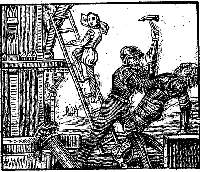 Gravure extraite de Les quatre fils d'Aymon, histoire héroïque, M. Ardant (Limoges), 1849 (Gallica : ark:/12148/bpt6k5734522, Bibliothèque nationale de France, département Littérature et art)